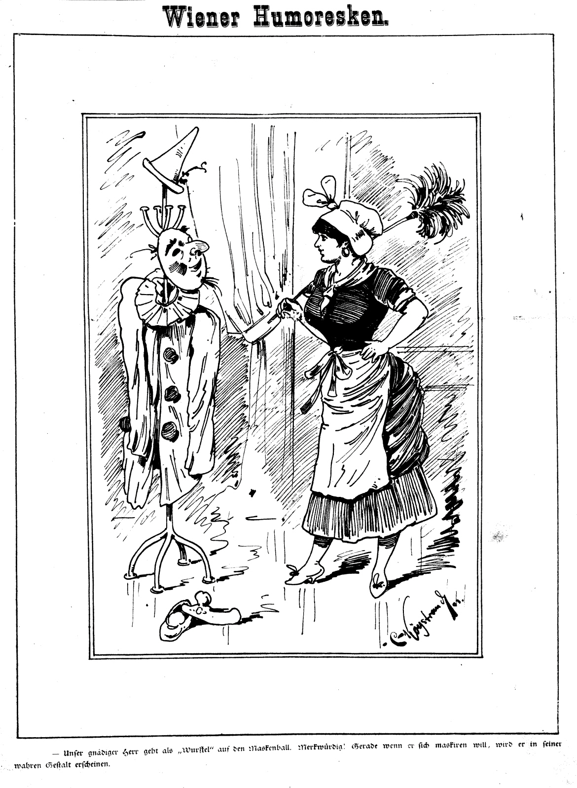 Unser gnädiger Herr...